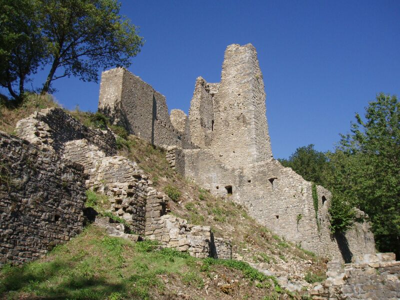 Ruine Schenkenberg oberhalb von Thalheim, Schweiz